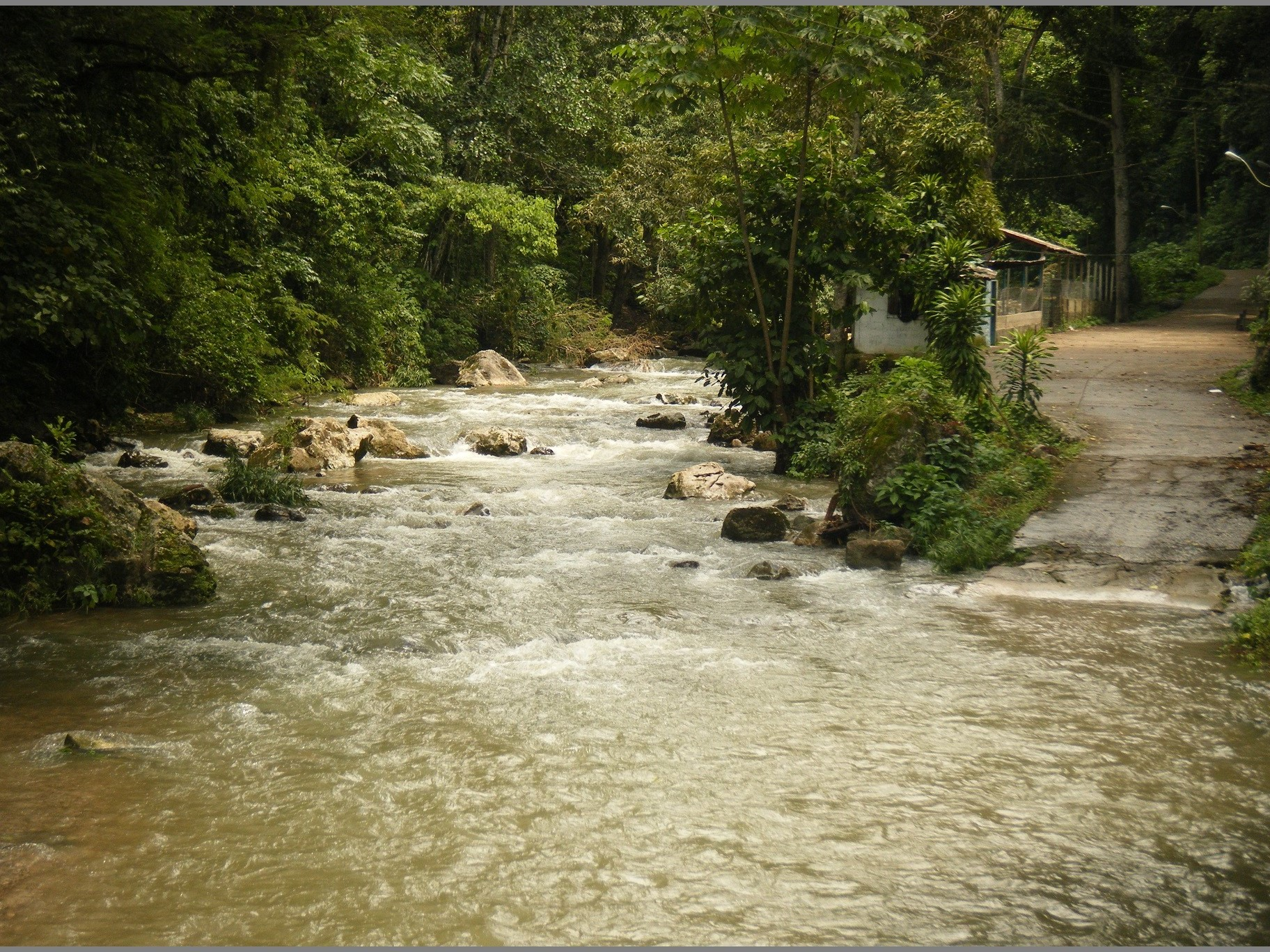 Rio Guarapiche en el poblado de Miraflores, Municipio Acosta, Monagas, Venezuela.